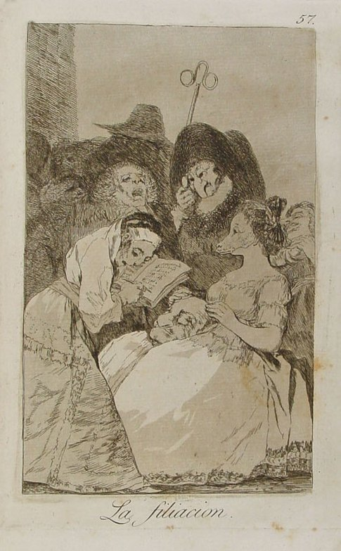 Capricho nº 57: La filiación de Goya, serie Los Caprichos